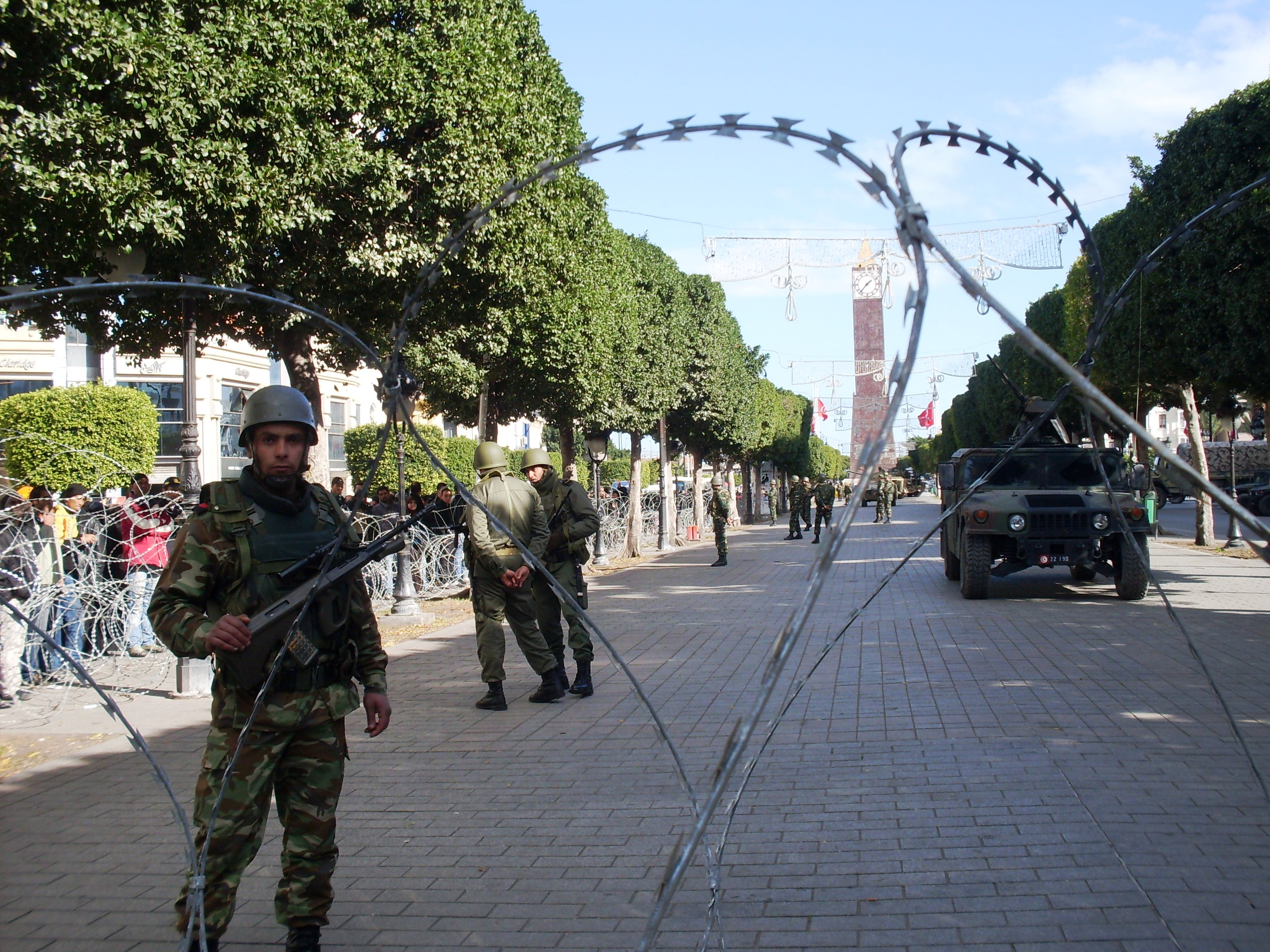 Avenue Habib Bourguiba sous surveillance militaire devant le ministère de l'intérieure lors de la révolution des jasmins